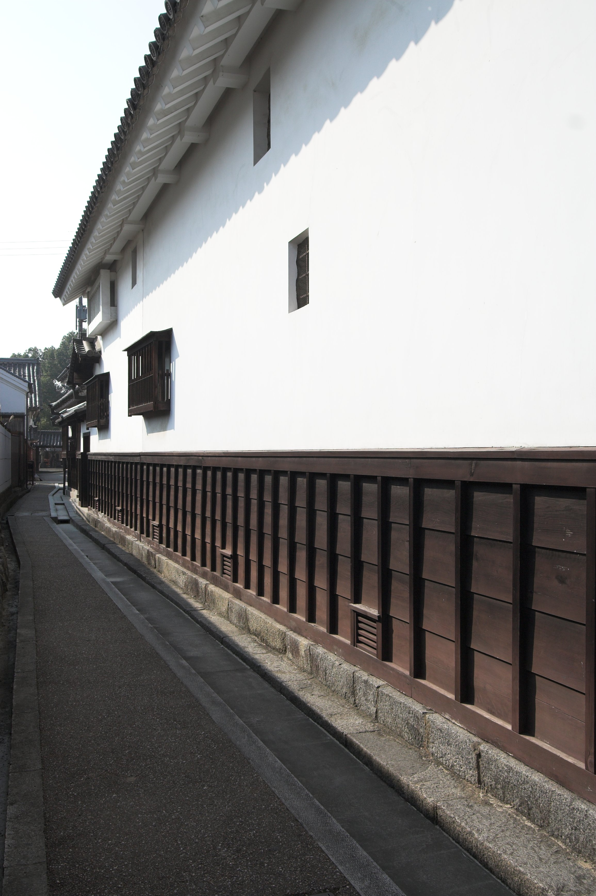 今西家住宅(奈良県橿原市, Japan)